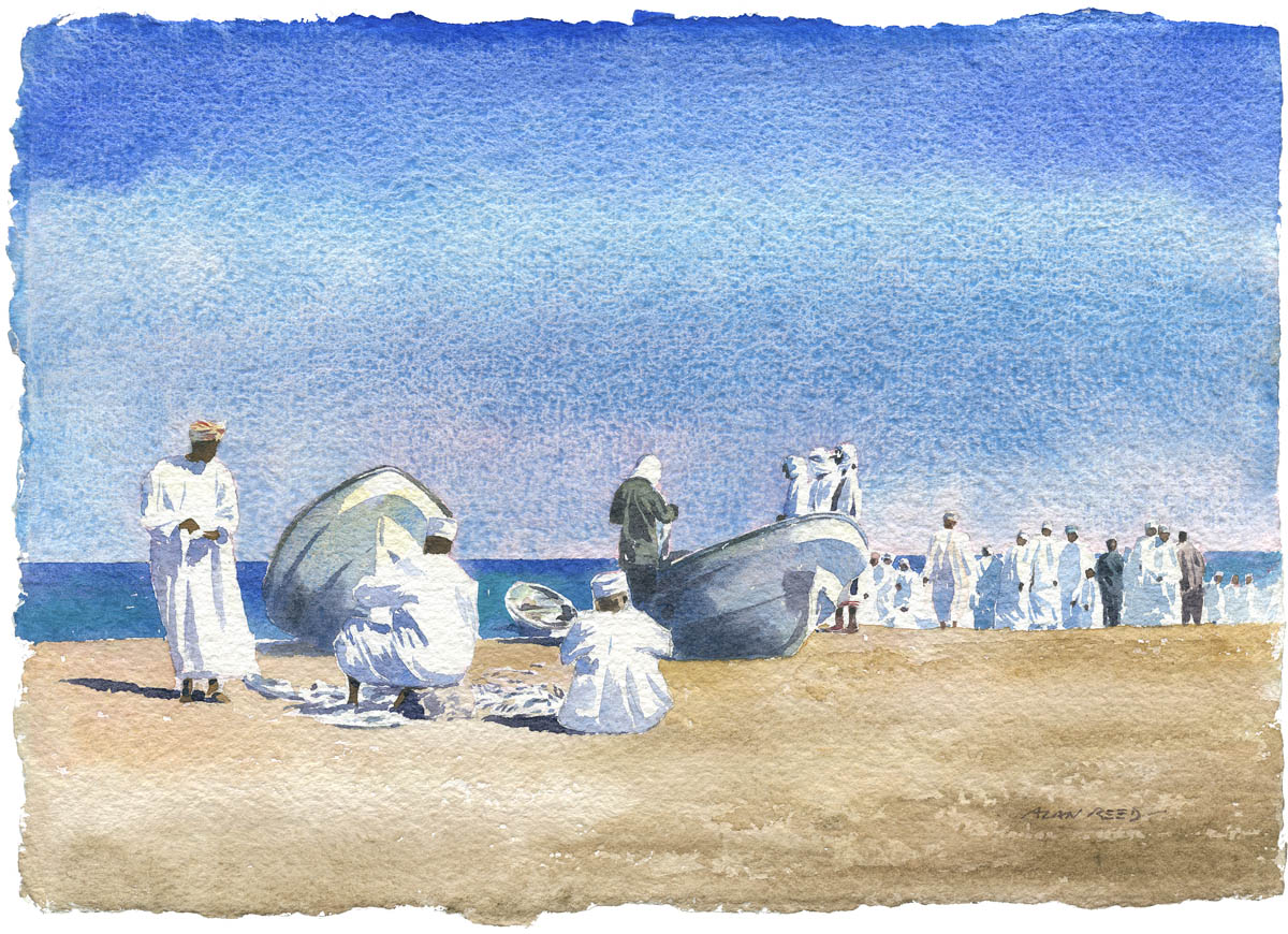 Beach Scene in Oman